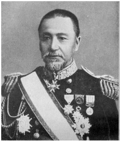 Admiraal Togo in 1907